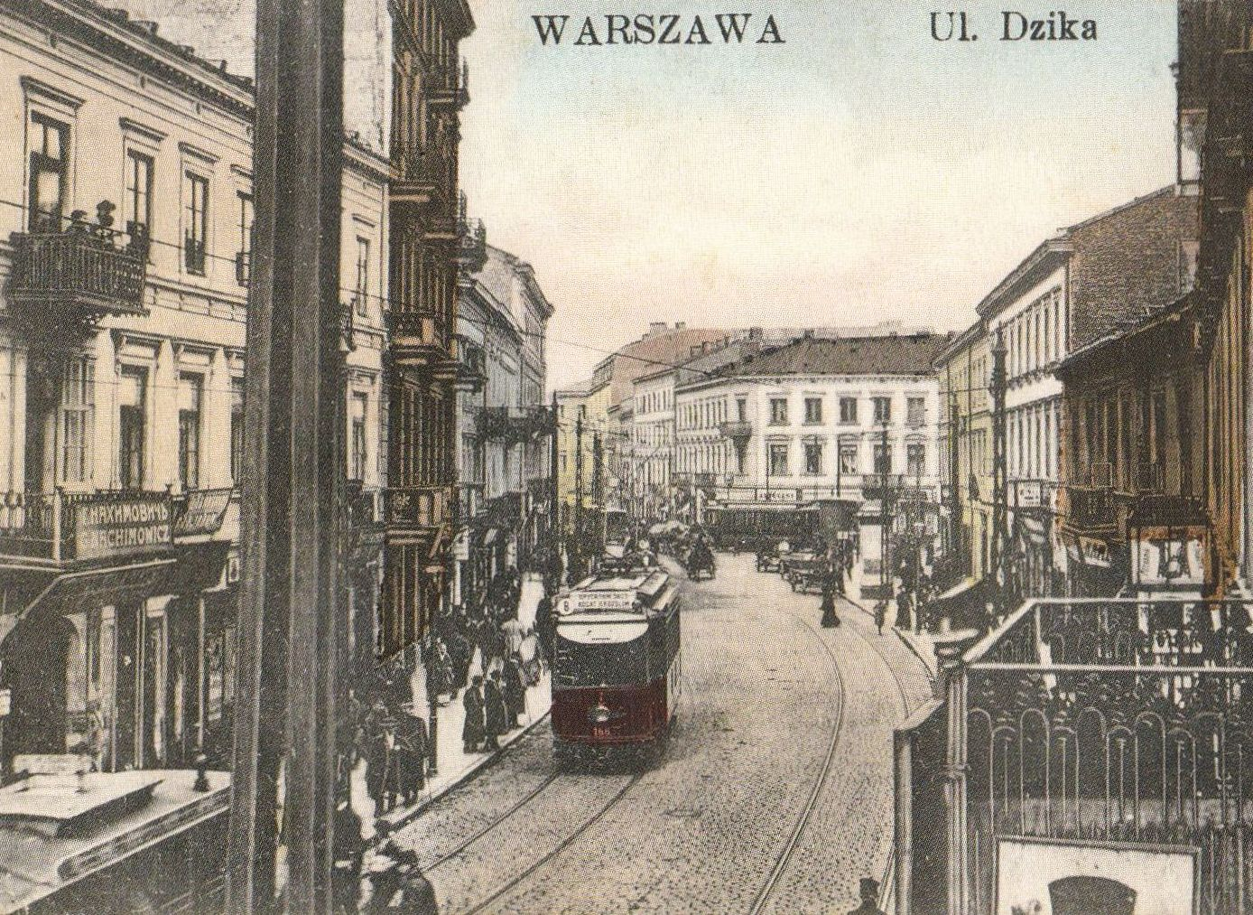 Ulica Dzika (obecnie Ludwika Zamenhofa) na odcinku między ul. Nowolipki i Gęsią